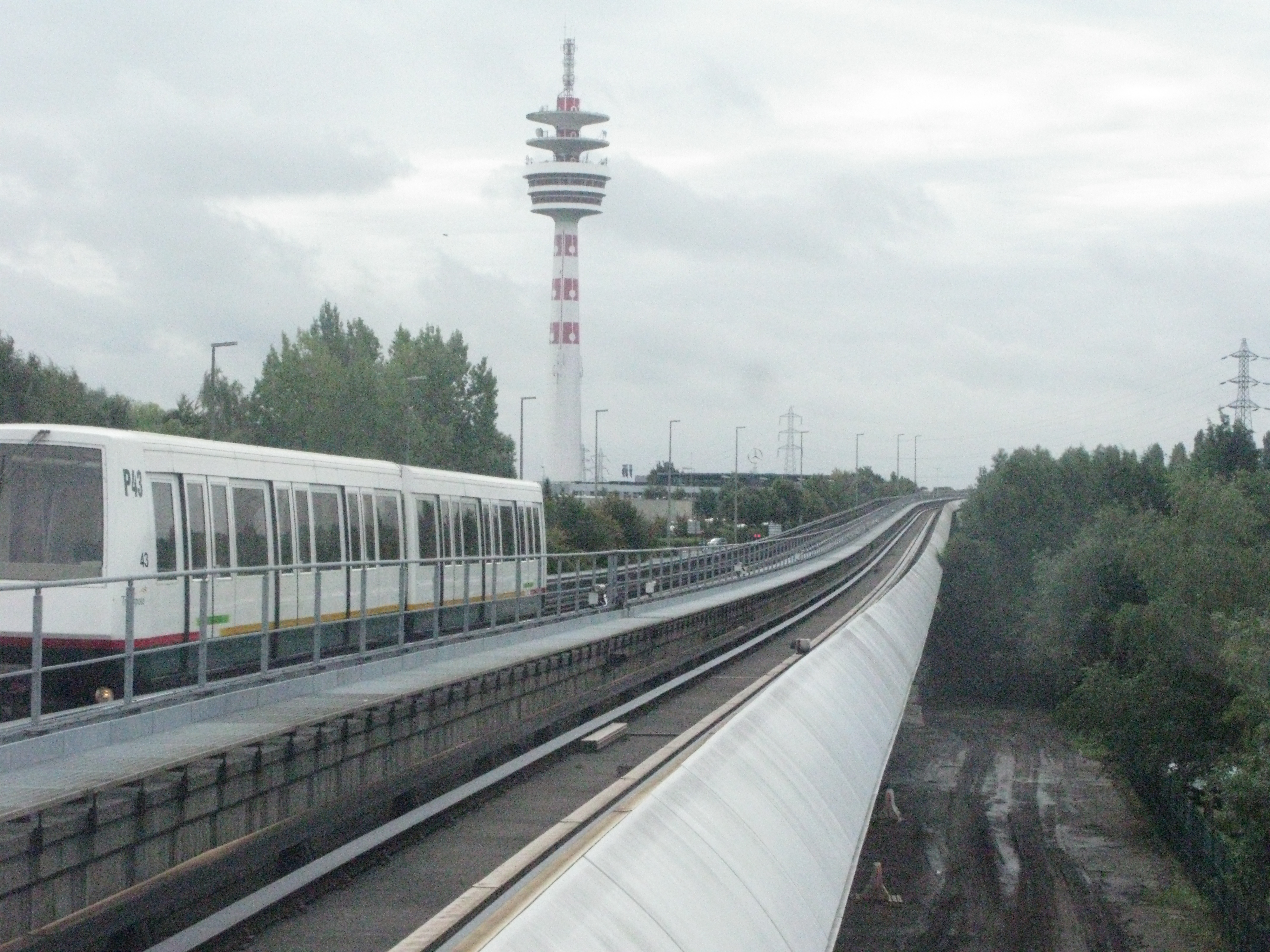 Métro arrivant à la station Les Prés, Villeneuve d'Ascq